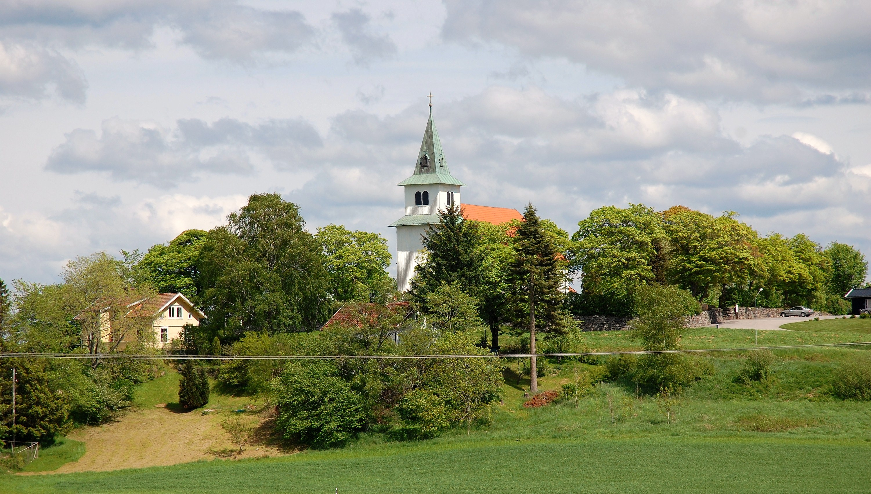 Foss kyrka.